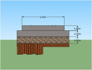 vue de face+cotations